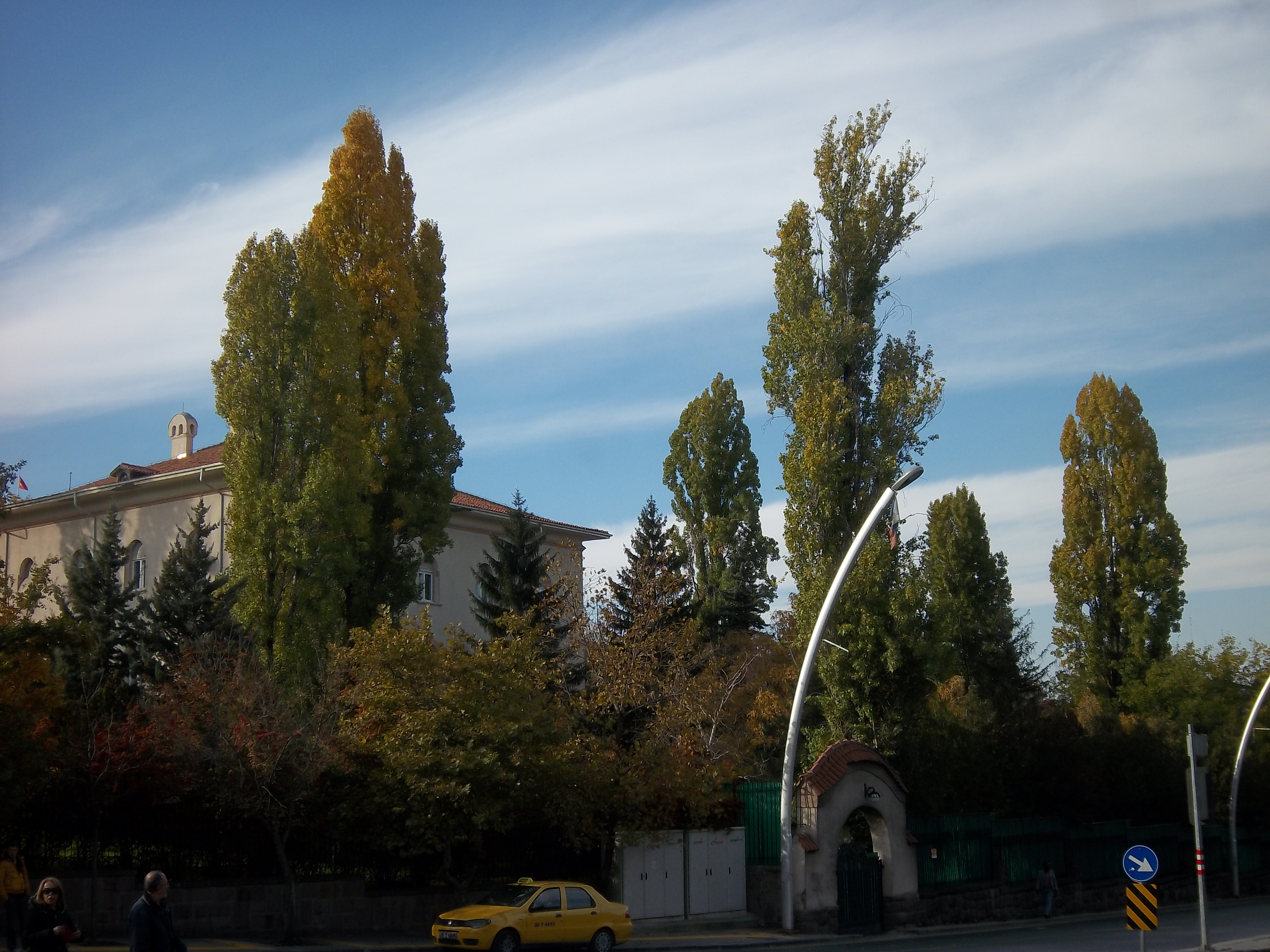 Srpskohrvatski / српскохрватски: Ambasada Srbije u Ankari.